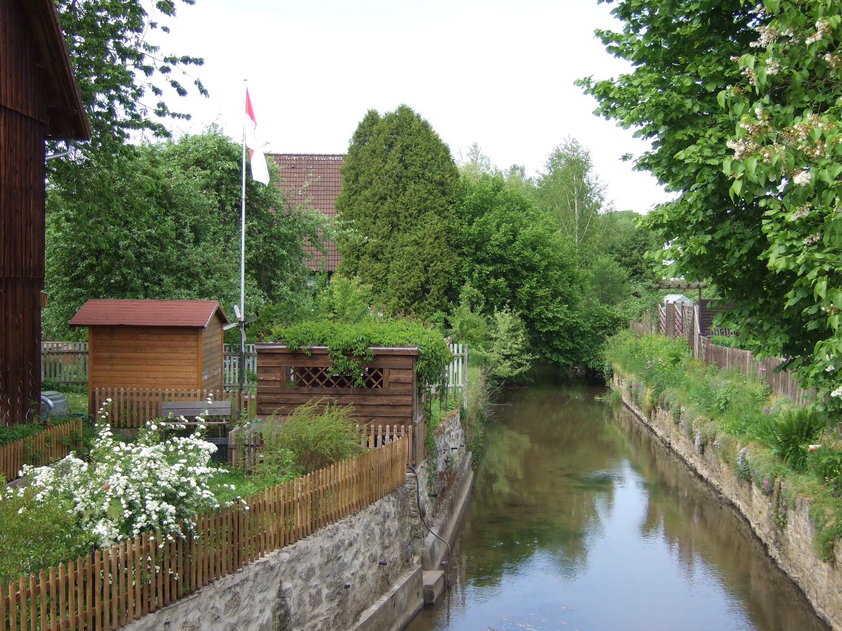 Die Trebgast in Trebgast